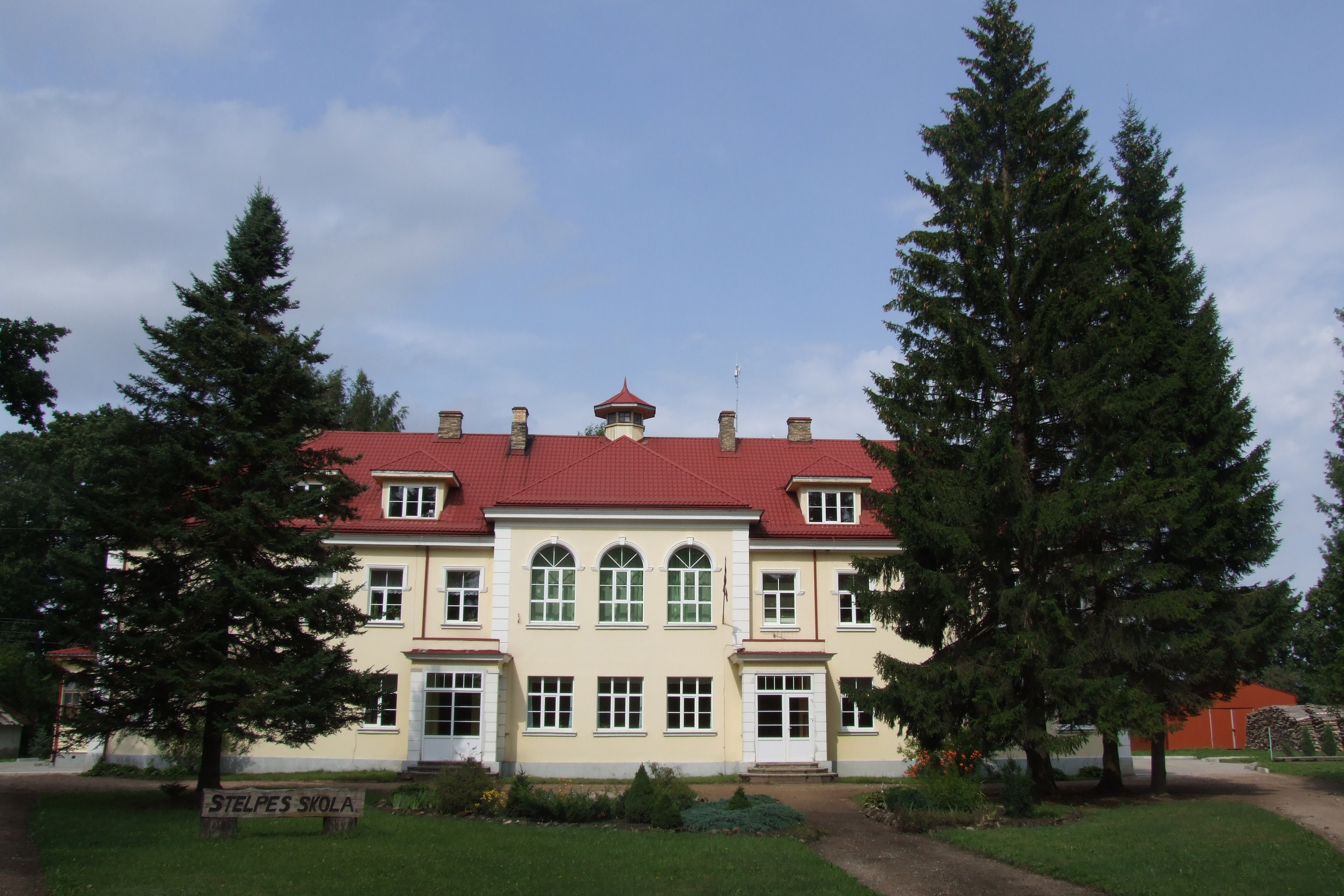 Stelpes skola